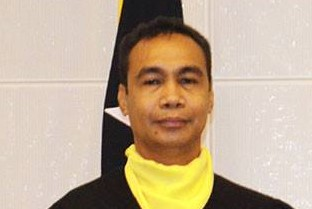 Deolindo dos Santos, Präsident des Tribunal de Recurso de Timor-Leste